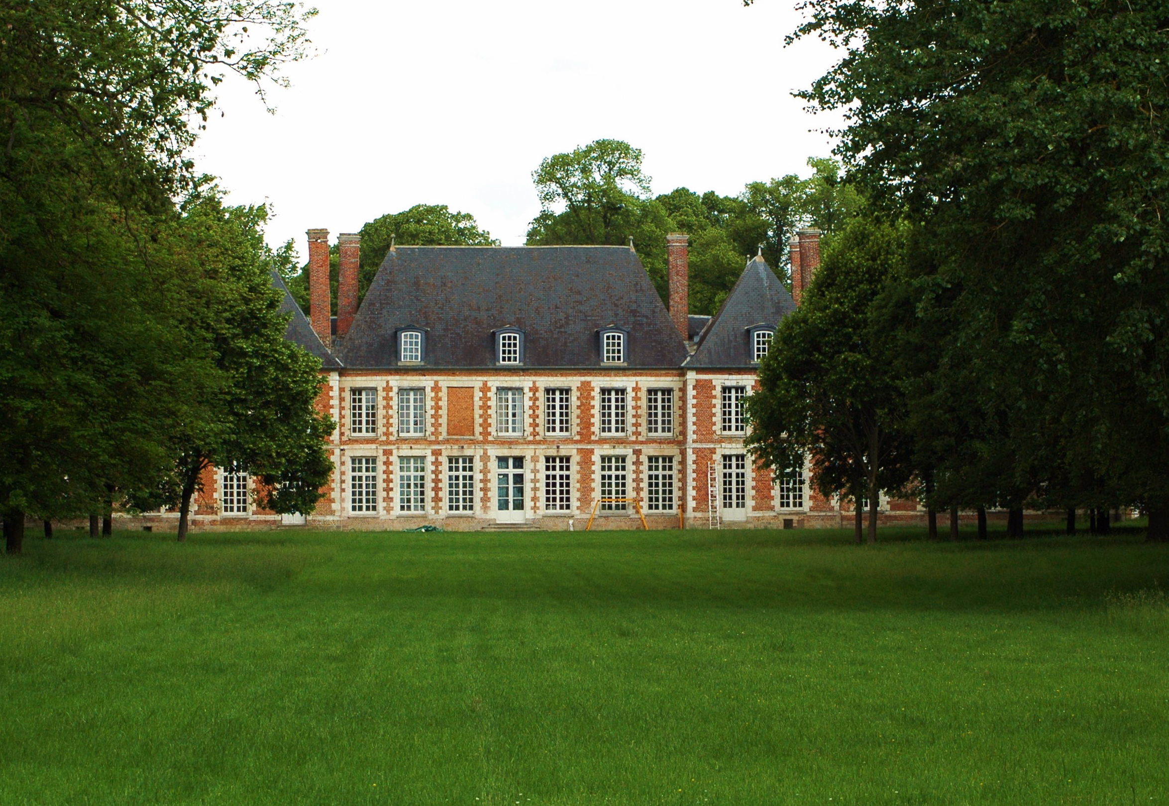 Ribeaucourt (Somme, France). Le château.